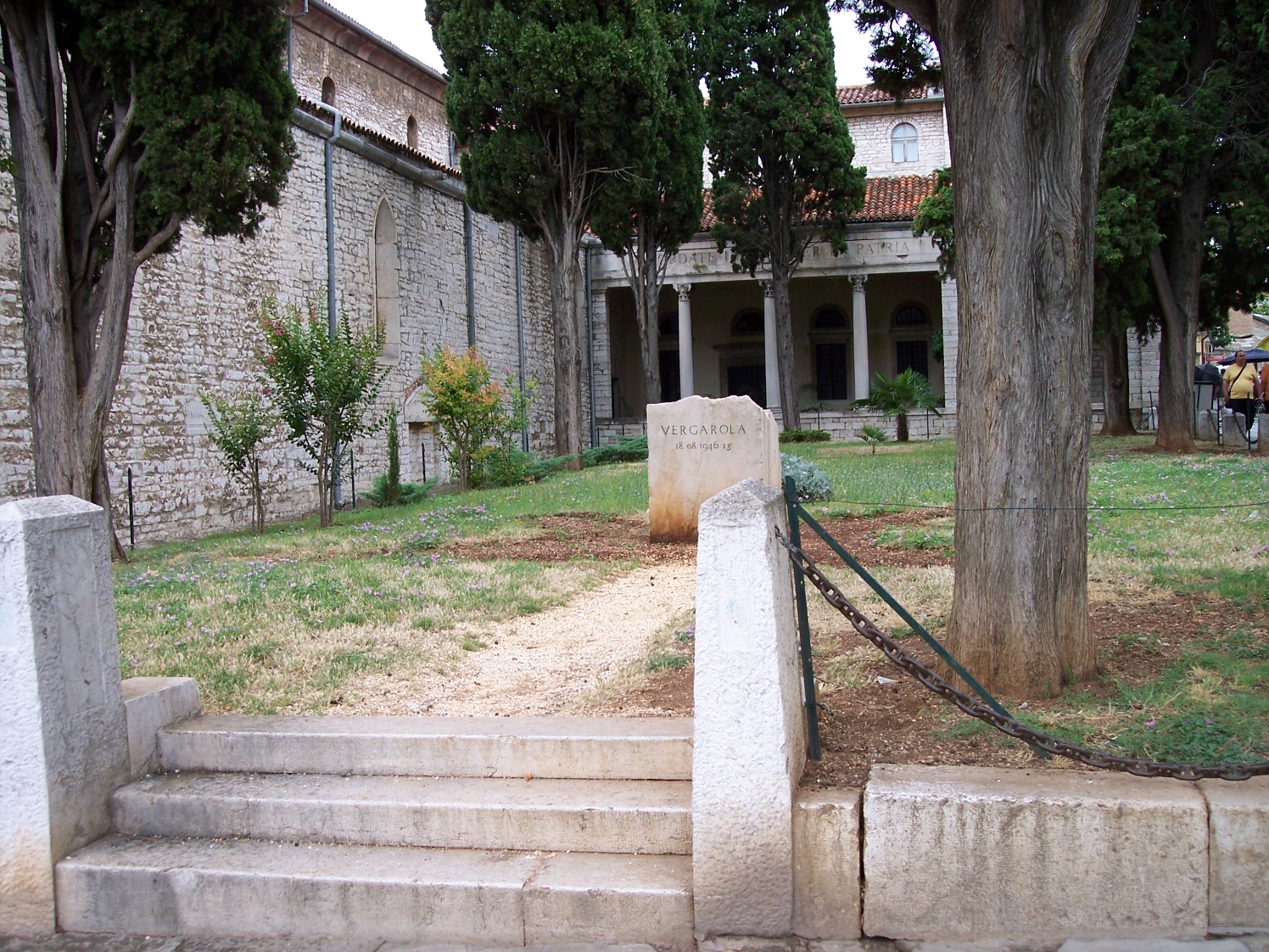 Pula - Vergarolla explosion memorial